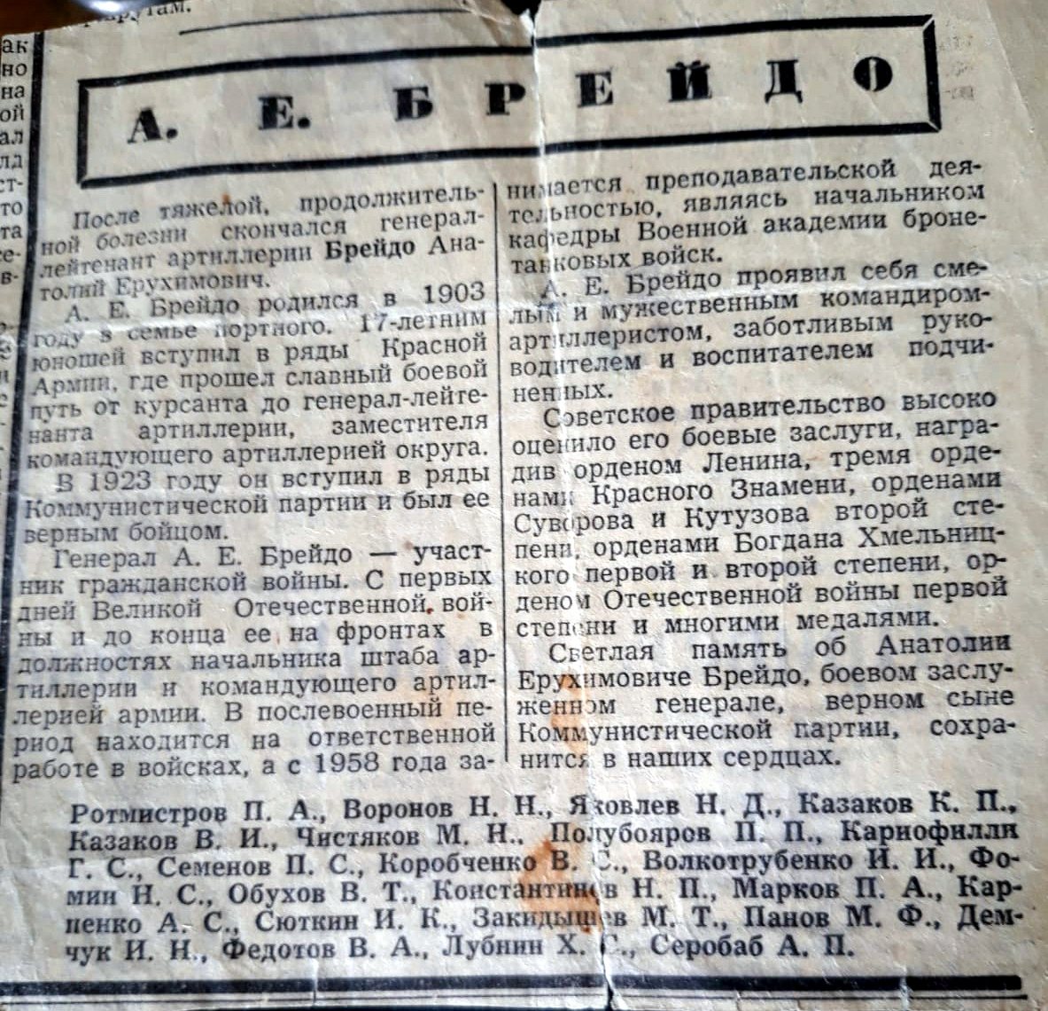 Некролог А.Е. Брейдо в газете Красная Звезда